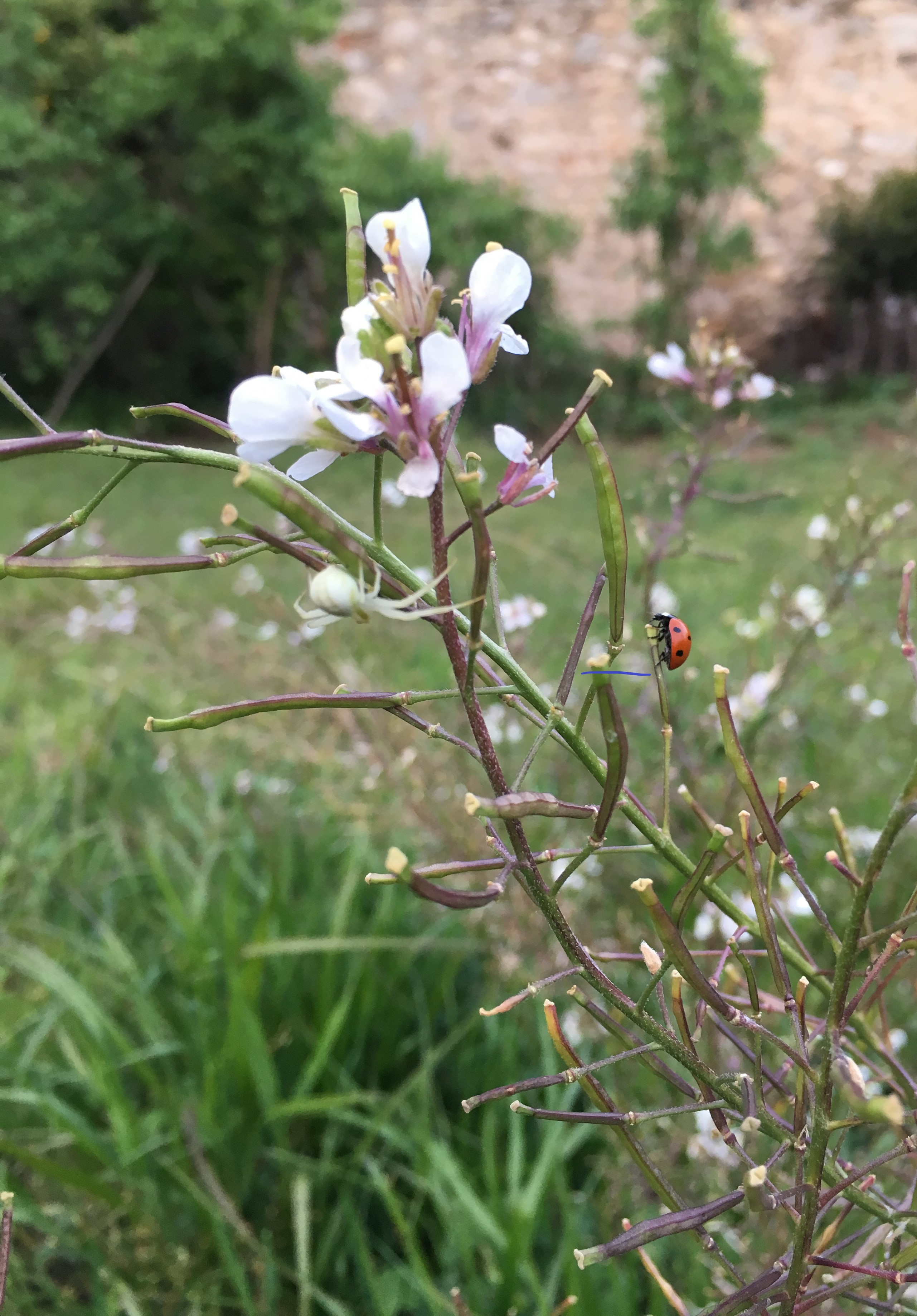 Diplotaxis erucodes - le photo permet d'observer les fruits, et la présence d'une coccinelle